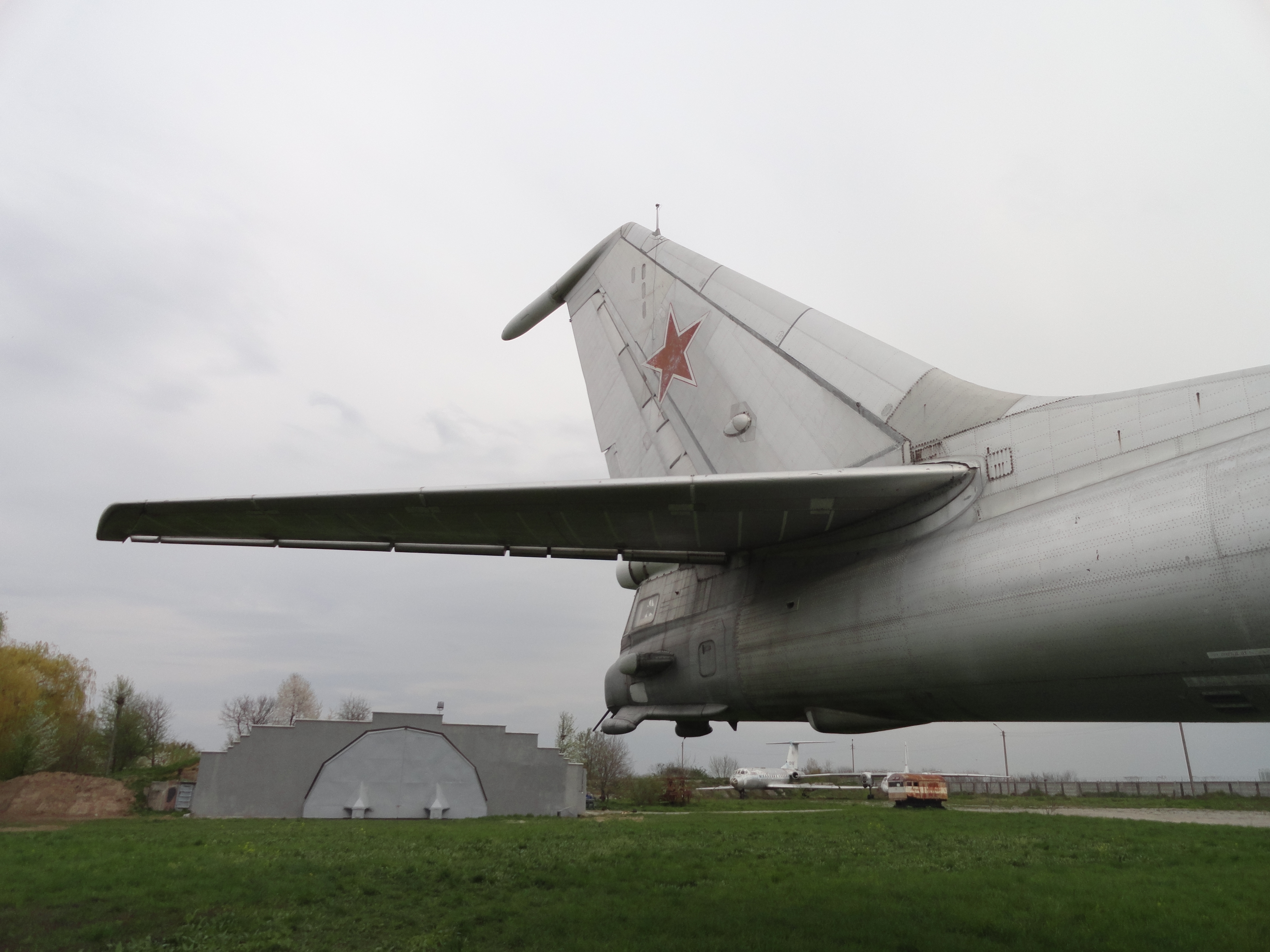 Ту-142 хвостовое оперение. Фото музей авиации Киев